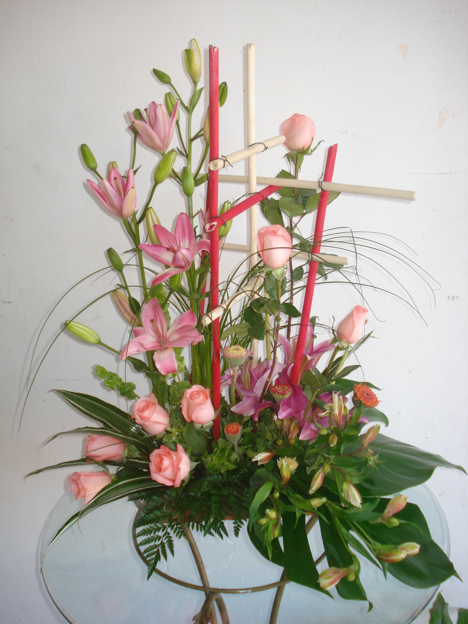 Diseño floral con rosas y lillies incluyendo pequeña estructura y accesorios de decoración.